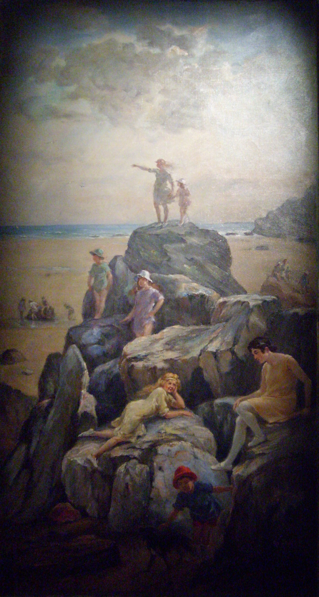 Scène de plage à Carteret, Adolphe Lalye. Exposition au Musée Thomas-Henry, Cherbourg-Octeville, prêt de la mairie de Barneville-Carteret.